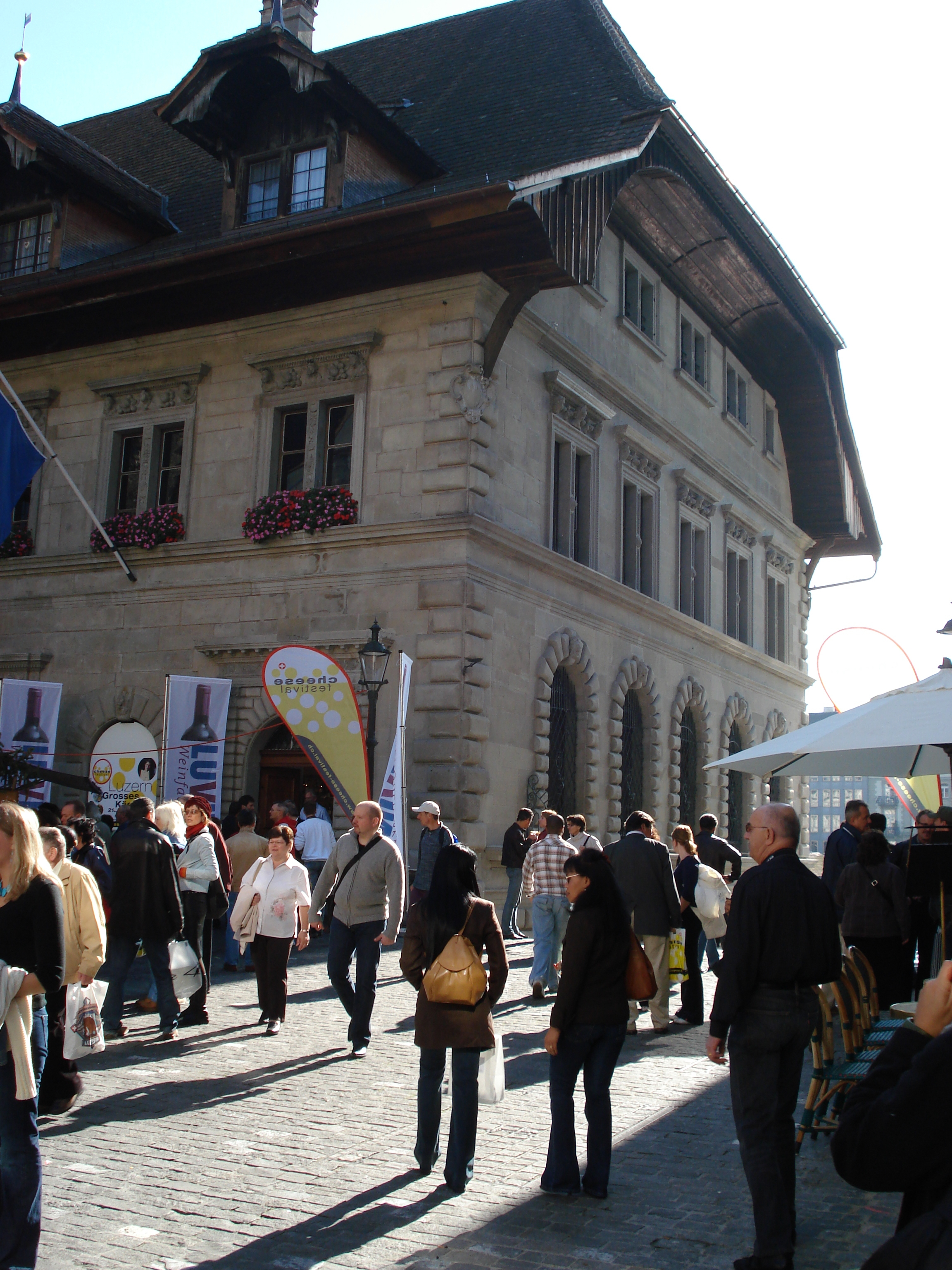 Luzerner Altstadt: Durchgang zum Rathausquai